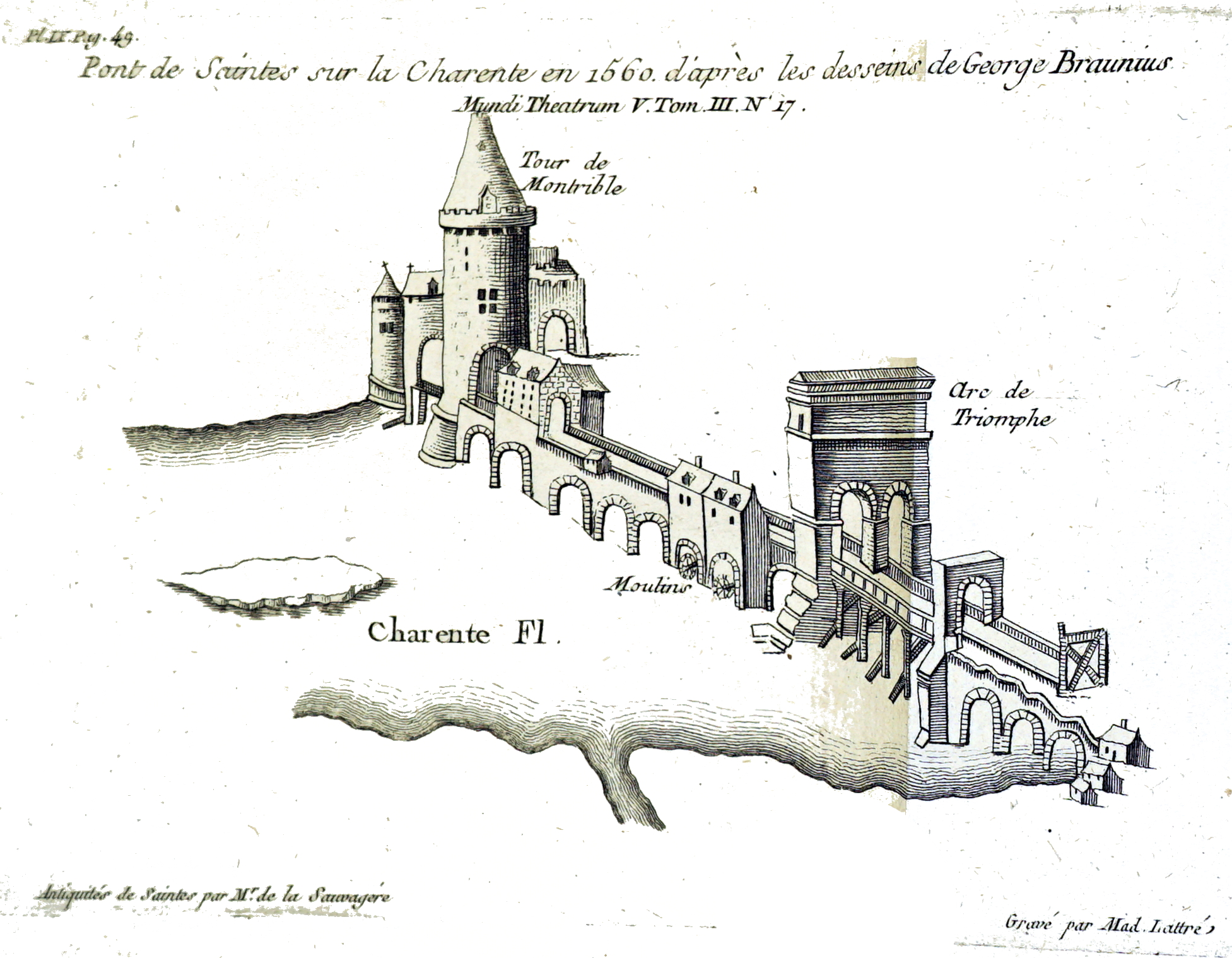 dessin extrait du livre.